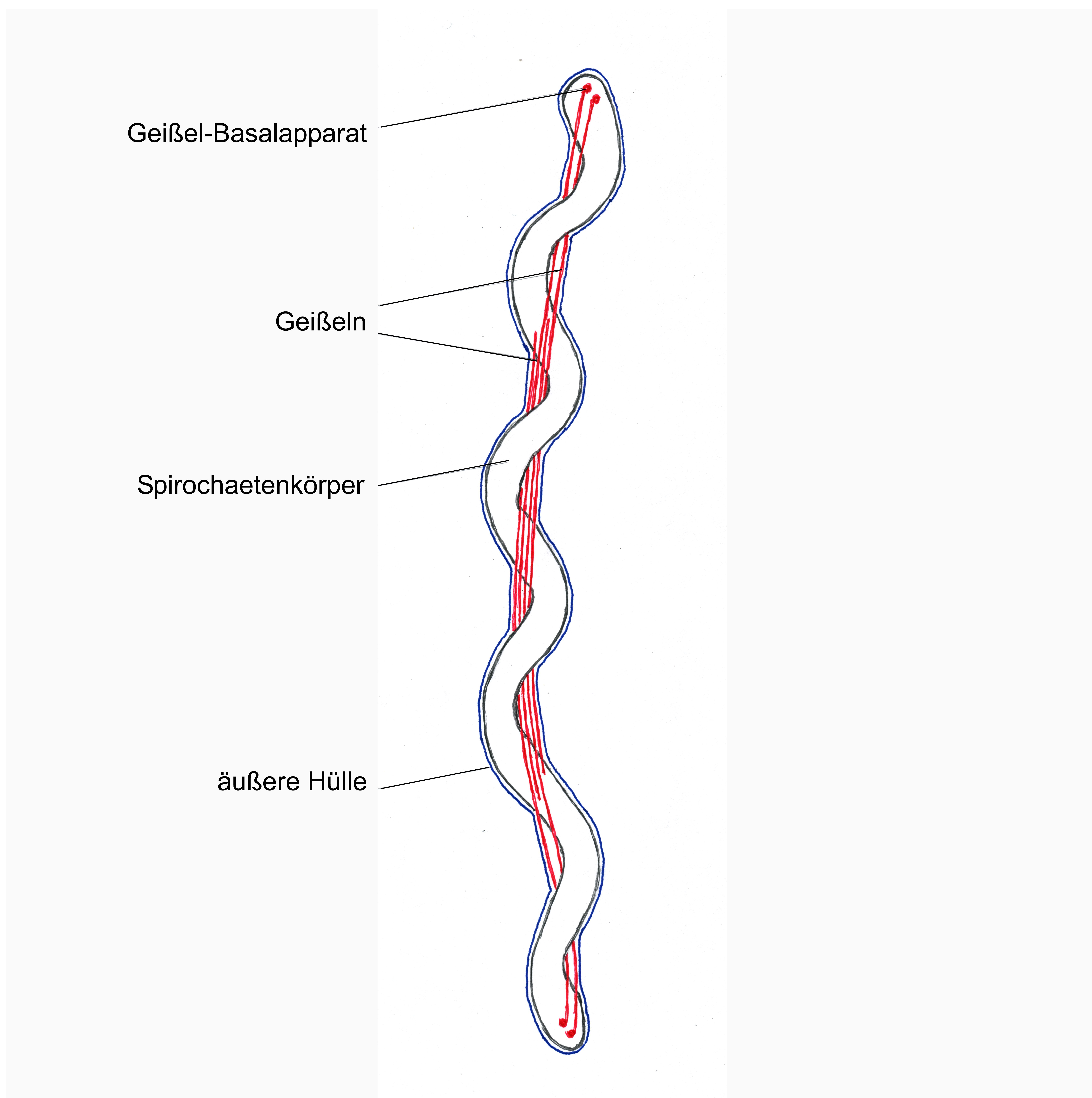 Schematische Darstellung einer Spirochaete